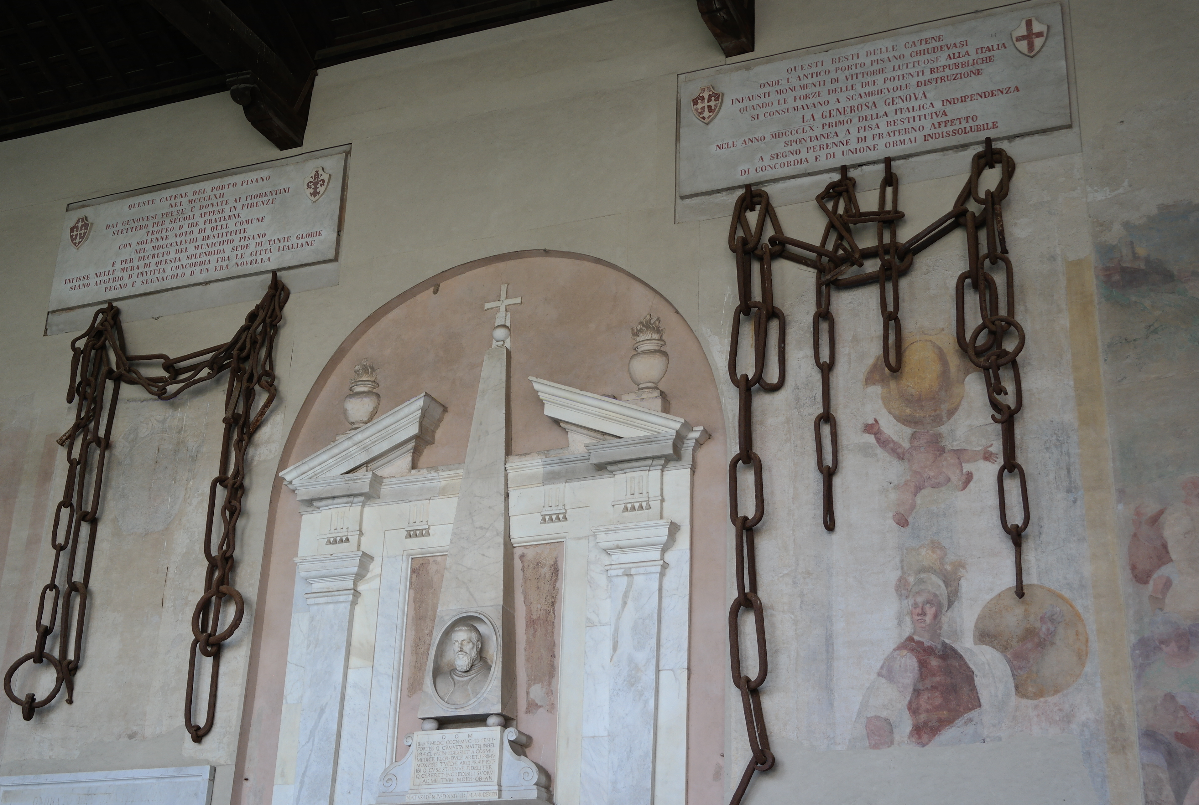 Catene dell'antico porto pisano, conservate nel Camposanto monumentale di Pisa